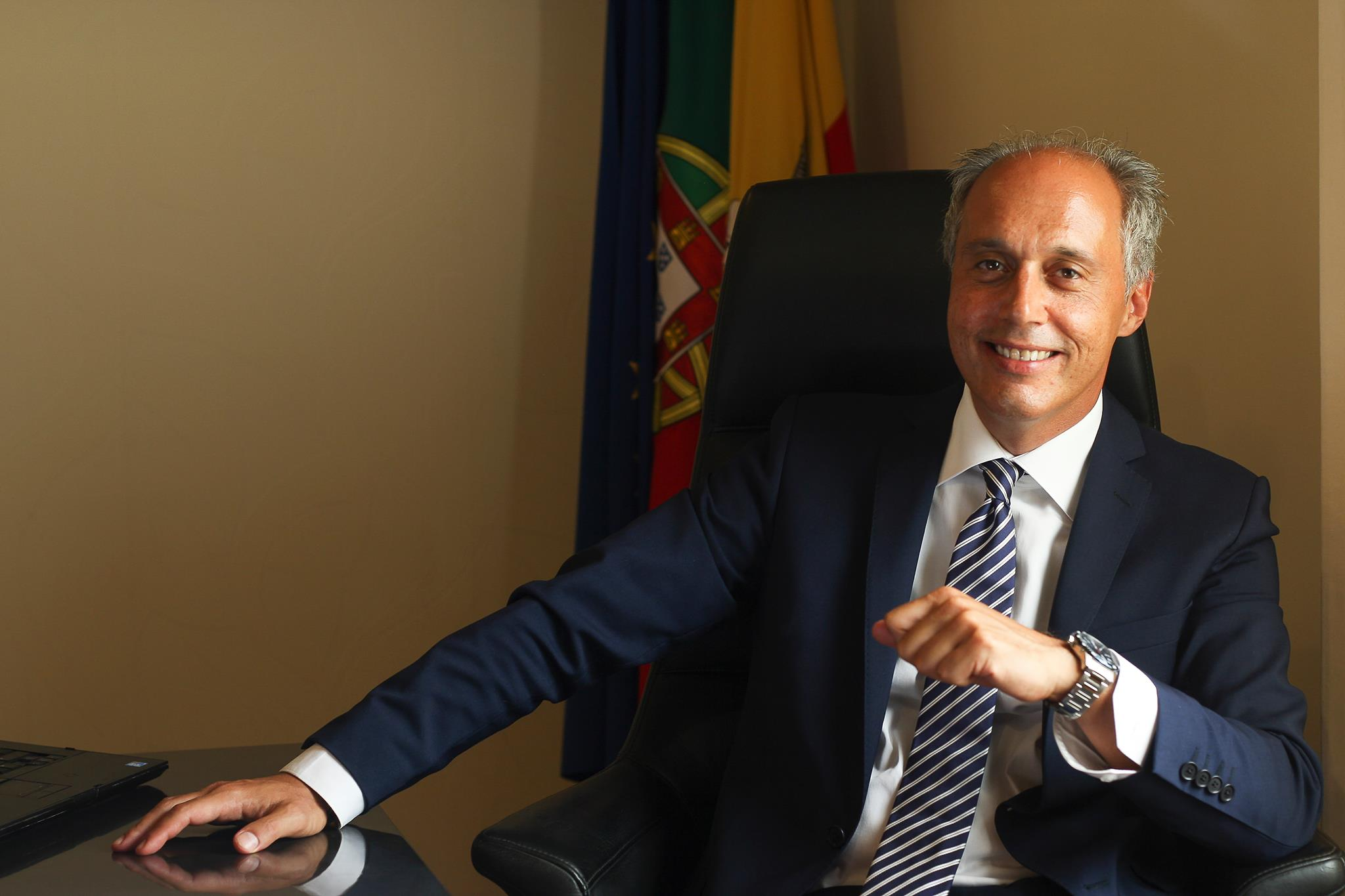 Advogado Período - 22 de Outubro de 2017 à actualidade 5.º Presidente da Câmara Municipal de Alcochete Período – 31 de OUTUBRO DE 2005 a 21 de Outubro de 2017 Vice-Presidente do Conselho Directivo da Associação Nacional de Município Portugueses Período - 23 de Junho de 2008 a 13 de Dezembro de 2009 Conselheiro do Conselho Geral da Associação Nacional de Município Portugueses Período - 23 de Novembro de 2013 até ao dia 9 de Dezembro de 2017 Presidente da Mesa da Assembleia Intermunicipal da Associação de Municípios da Região de Setúbal Período - Dezembro de 2005 a 18 de Outubro de 2013 Presidente do Conselho Estratégico da Reserva Natural do Estuário do Tejo Período - 16 de Dezembro de 2013 a 23 de Outubro de 2017 Conselheiro do Conselho Consultivo do Tribunal Judicial da Comarca de Lisboa Período - durante todo o mandato 2013-2017 Membro da Junta Metropolitana e do Conselho Metropolitano da Área Metropolitana de Lisboa Período – de 2005 a 2017